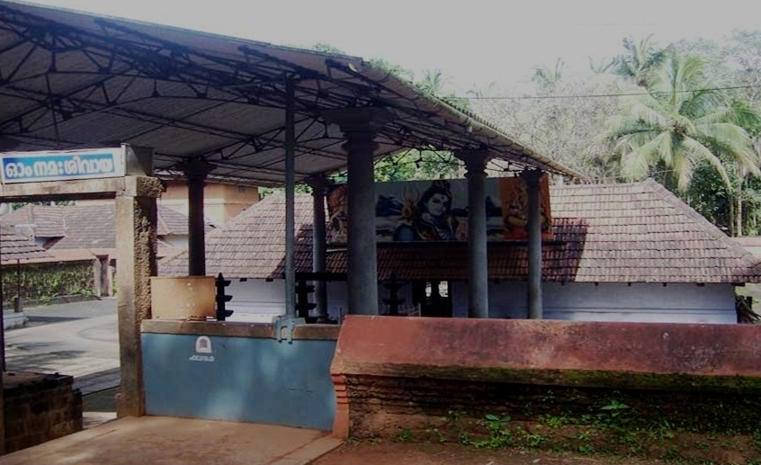 പുരമുണ്ടേക്കാട്ട് മഹാദേവക്ഷേത്രം, മലപ്പുറം